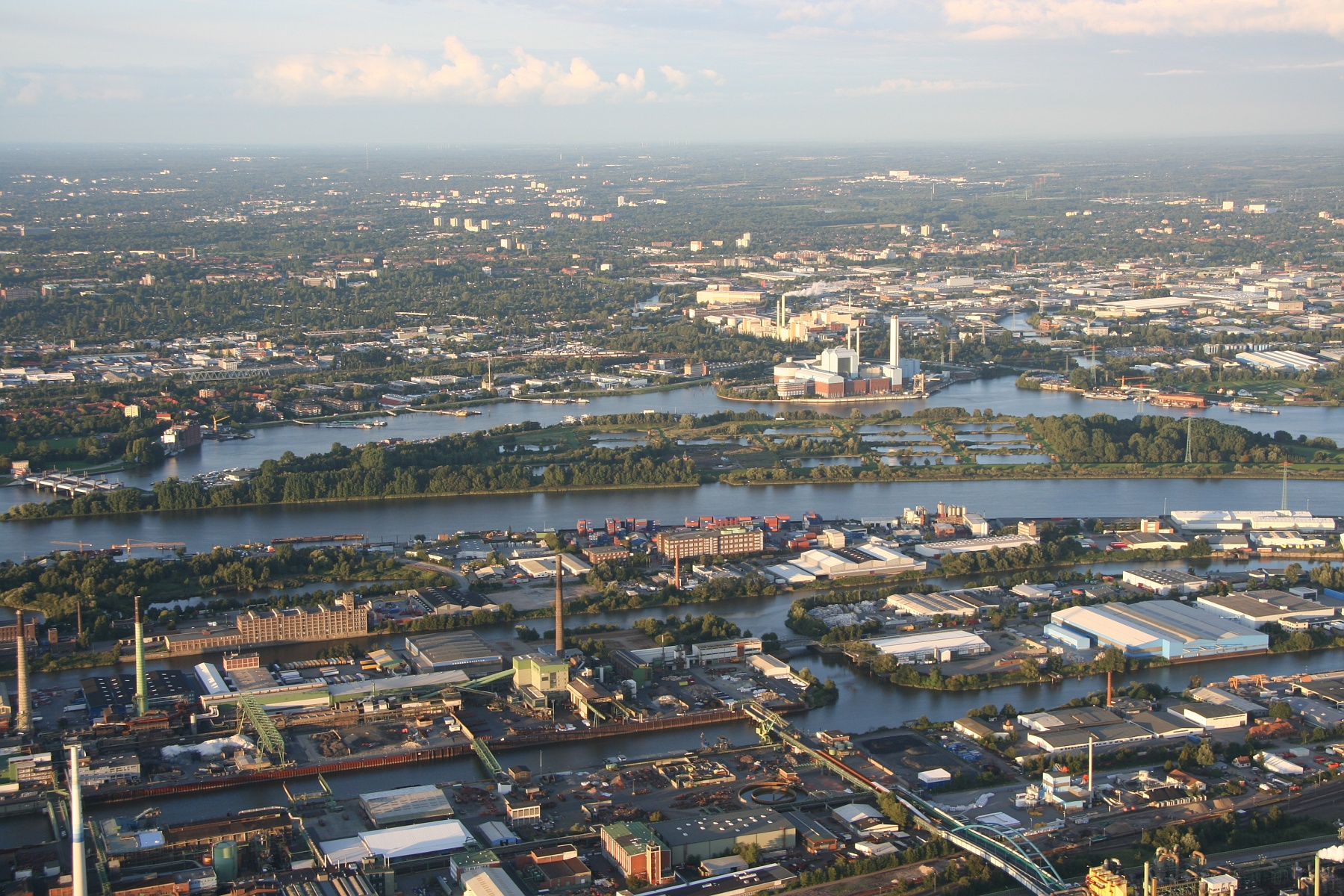 Tiefstack: Elbinsel Kaltehofe, ehemaliges Elbwasserwerk